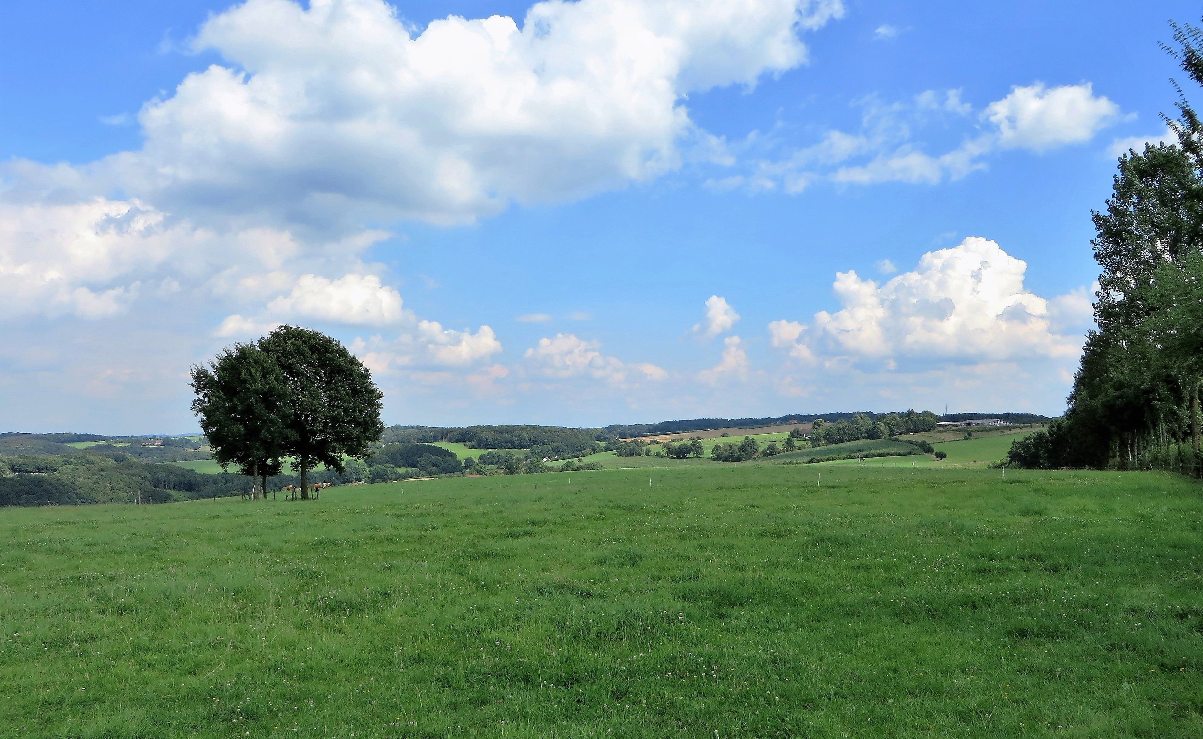 Landschaftsschutzgebiet „Kettelberg und Hof Wahl“ in Hagen, südöstlich von Hamperbach. Es handelt sich um ein wertvolles Waldgebiet (z.T. Altbestände des Hainsimsen-Buchenwaldes) mit Siepen und z.T. landwirtschaftlich genutzte Hochflächen. Blick über einen Teilbereich der Hochfläche bei Hof Wahl. Im Hintergrund bis zum Horizont befindet sich das Landschaftsschutzgebiet „Breckerfeld“.